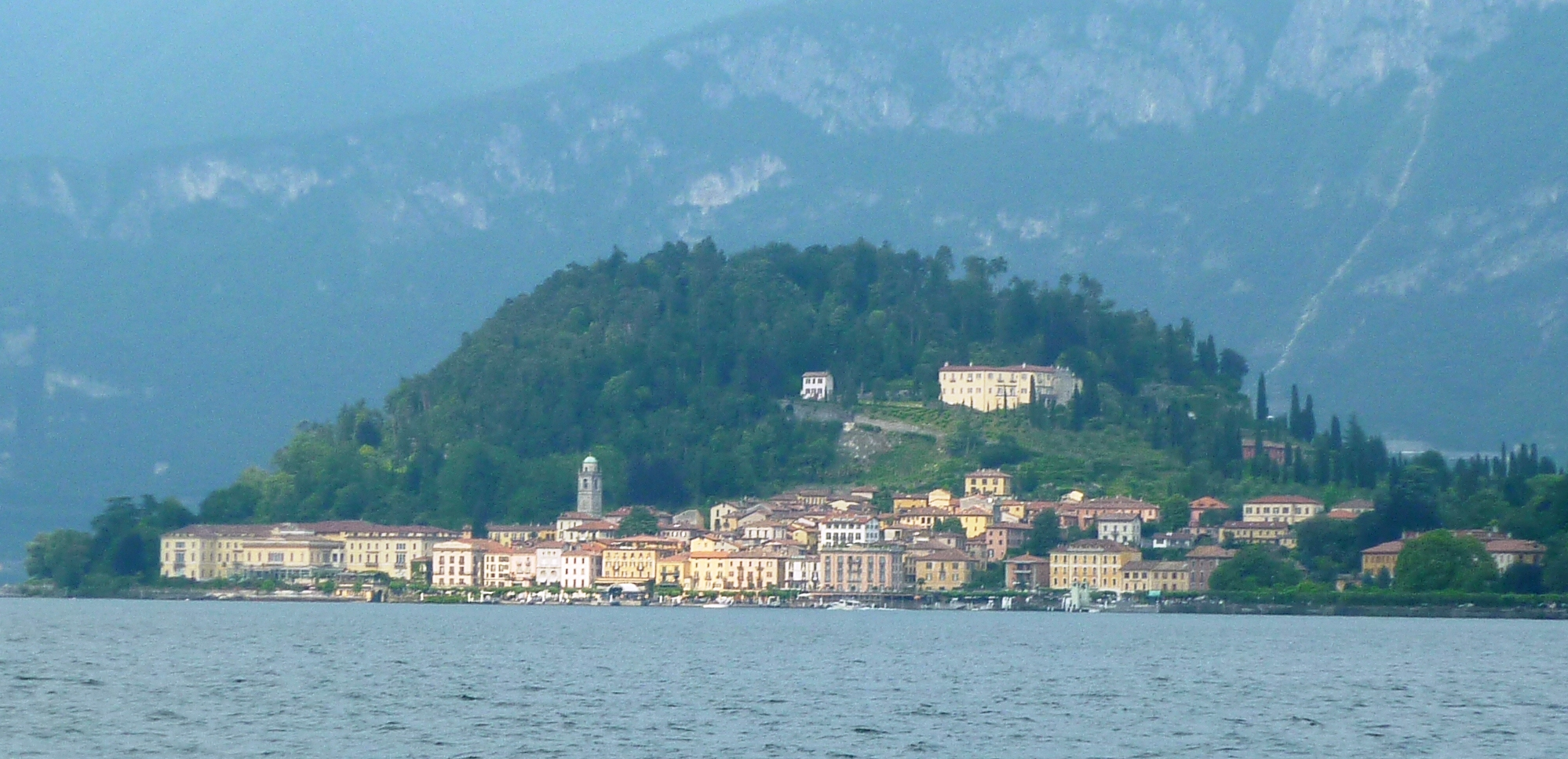 Villa Serbelloni, Bellagio, Comersee, Italien